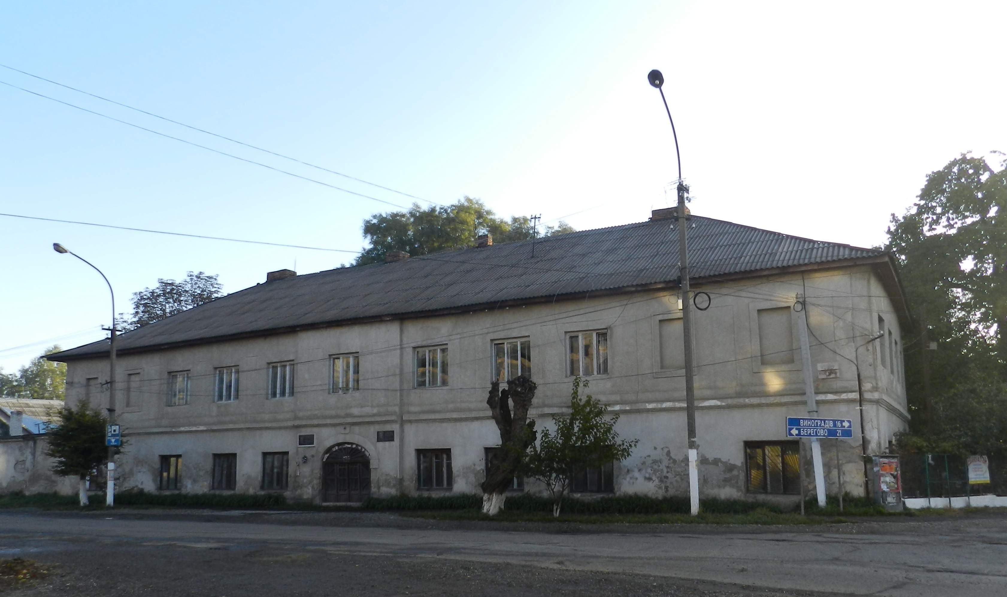 Селище Вилок, Виноградівський район, Закарпатська область. Будівля "Соляного дому" (поч. 15 ст).